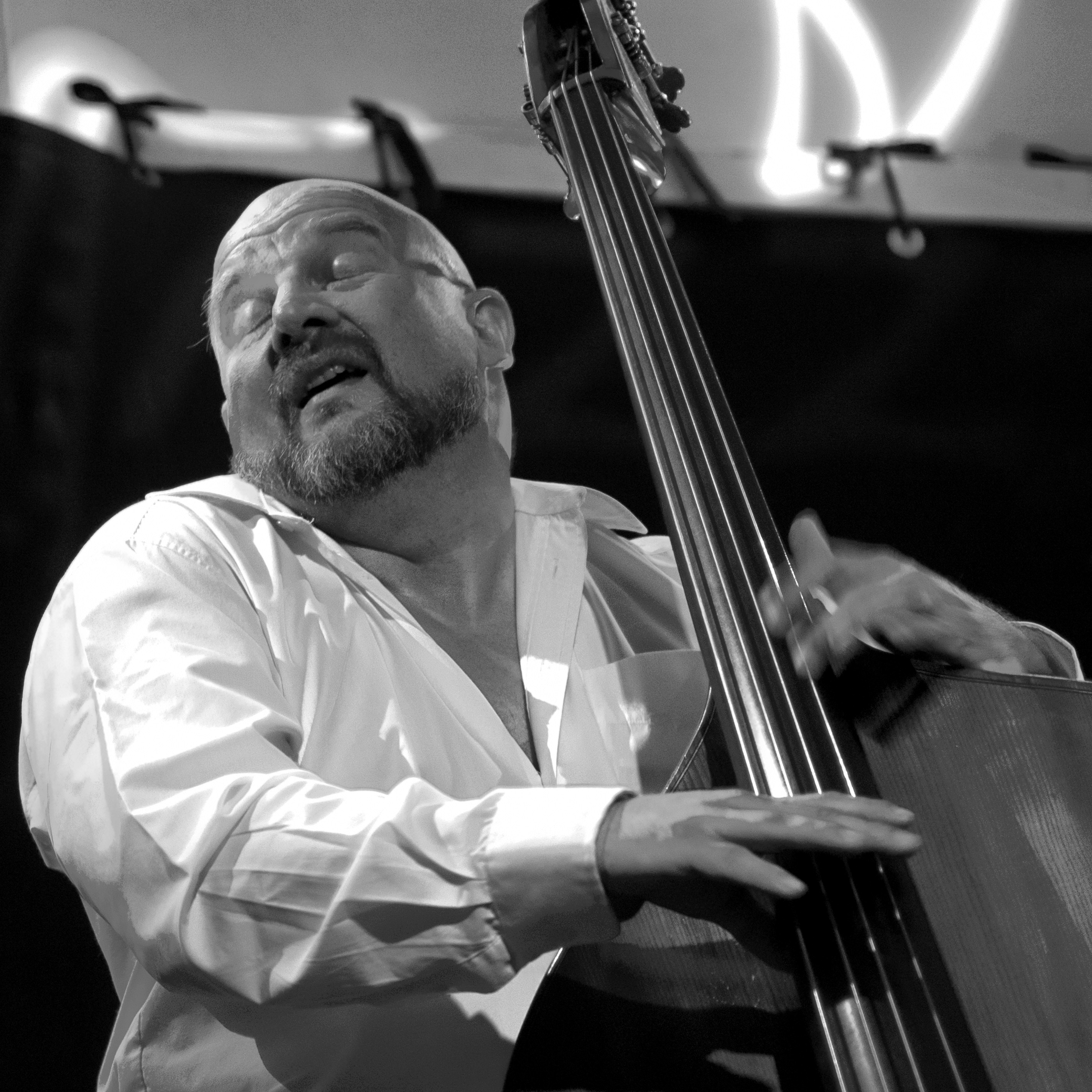 Portrait du contrebassiste hollandais Hein Van de Geyn en concert au sein du "André Ceccarelli Trio" le 2007-08-08 à Cap d'Ail (Alpes Maritimes) au cours du festival "Cap Jazz".